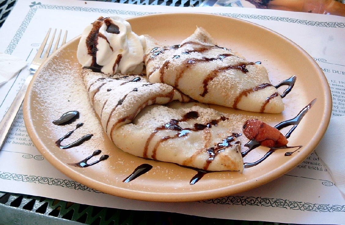 Patschinke (fotografiert in Bratislava), gefüllt mit verschiedenen Marmeladen oder Nuss, wie sie in Österreich, Tschechien, in der Slowakei oder in Ungarn serviert wird